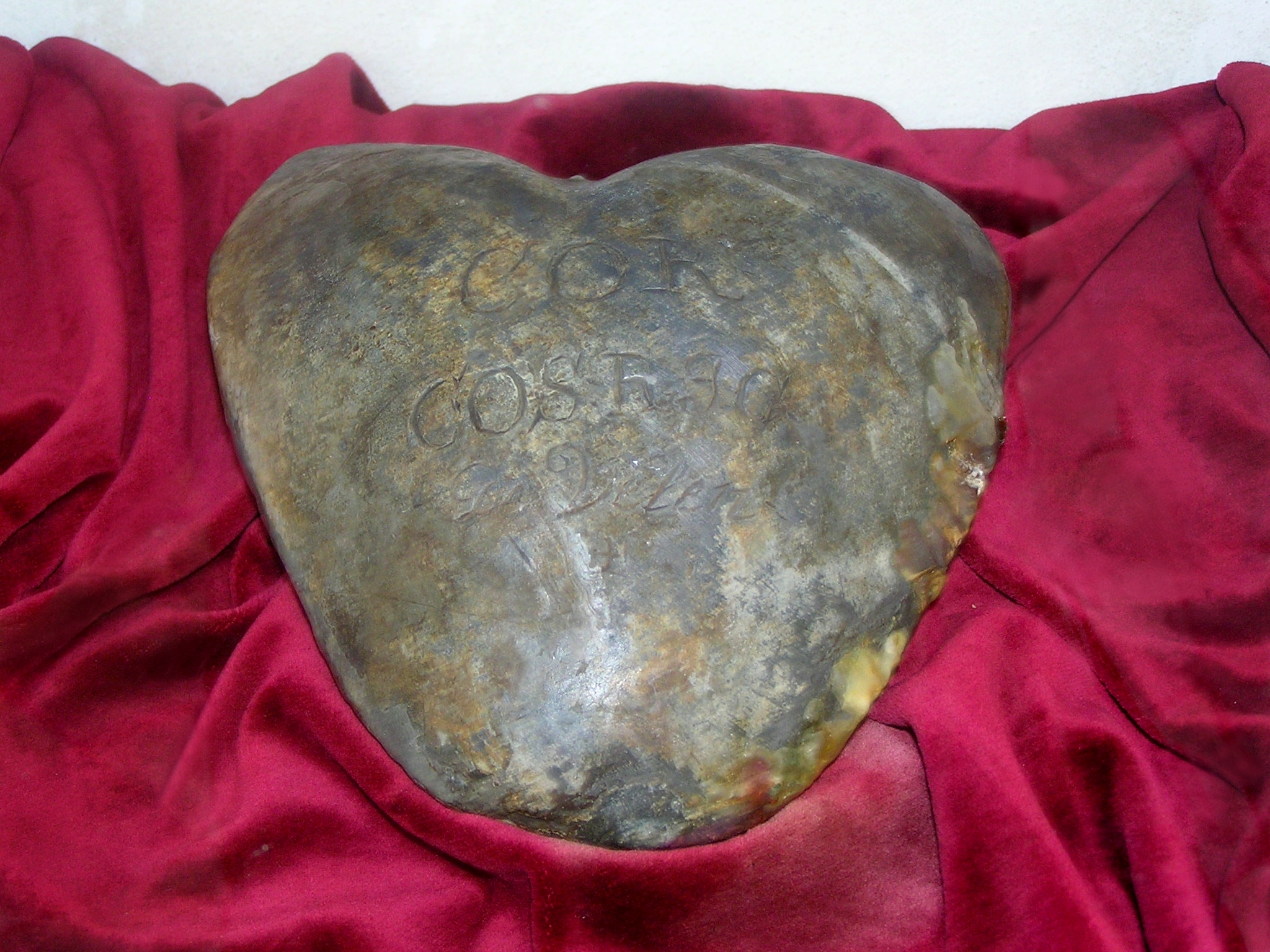 Bleiernes Herz von Christoph Otto von Velen (1671-1733) in der Kapelle von Schloss Raesfeld